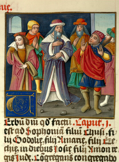 Sophonie s'adressant au peuple. Valenciennes - BM - ms. 0007 (f. 183)